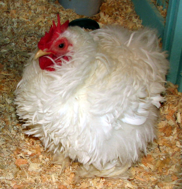 A Frizzle Leghorn chicken